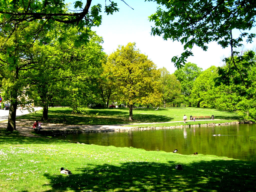 Campussee